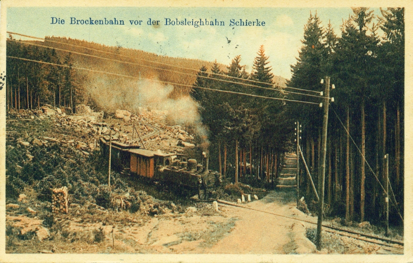 Kreuzungspunkt der Alten Bobbahn Schierke mit der Strecke der Brockenbahn nördlich von Schierke